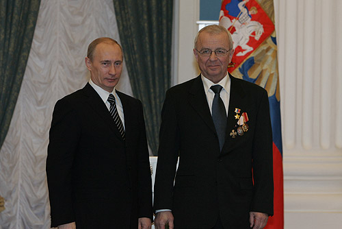 МОСКВА, КРЕМЛЬ. Вручение государственных наград. Звание Героя России присвоено пилоту глубоководного обитаемого аппарата «Мир-1», участнику высокоширотной арктической глубоководной экспедиции «Арктика-2007» Анатолию Сагалевичу.